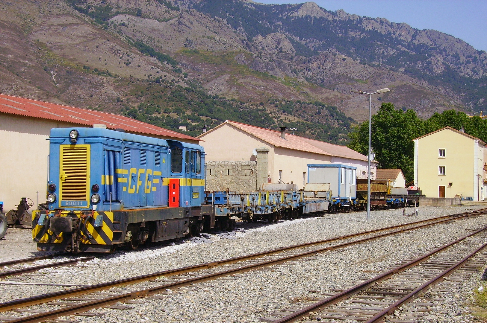 Un train de travaux de la société Constructions Ferroviaires Giragr (CFG), stationne en gare de Corte le 22 juillet 2009.